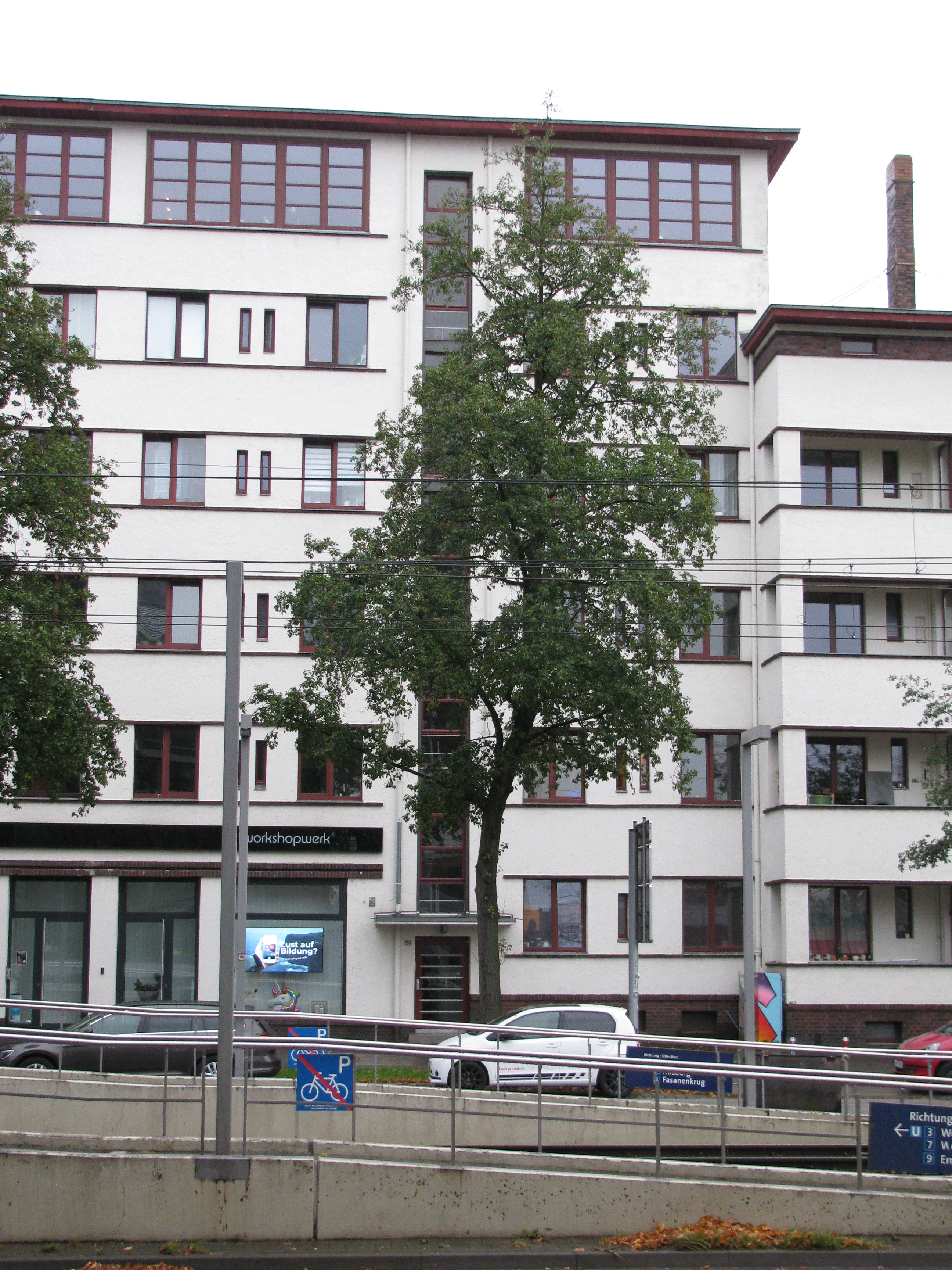 das Haus Podbielskistraße 288 in Hannover